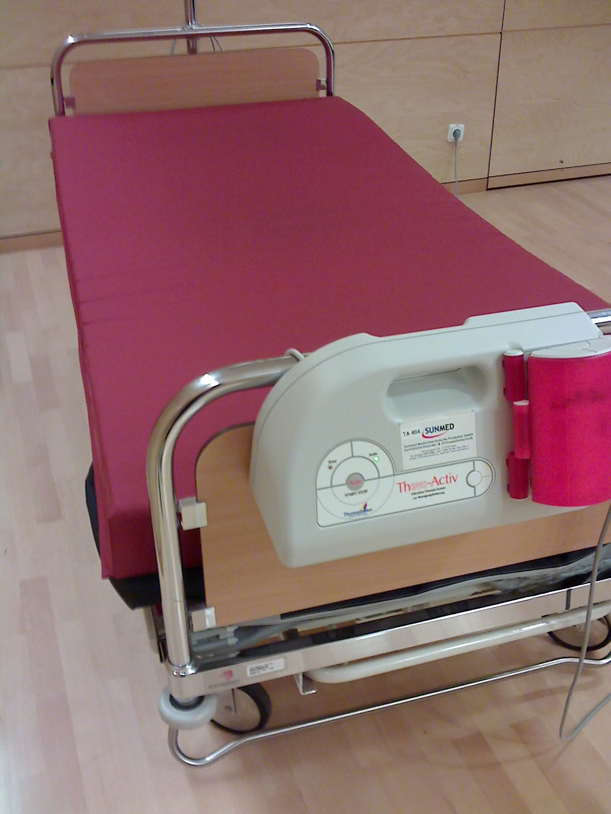 Thevo Activ Matratze